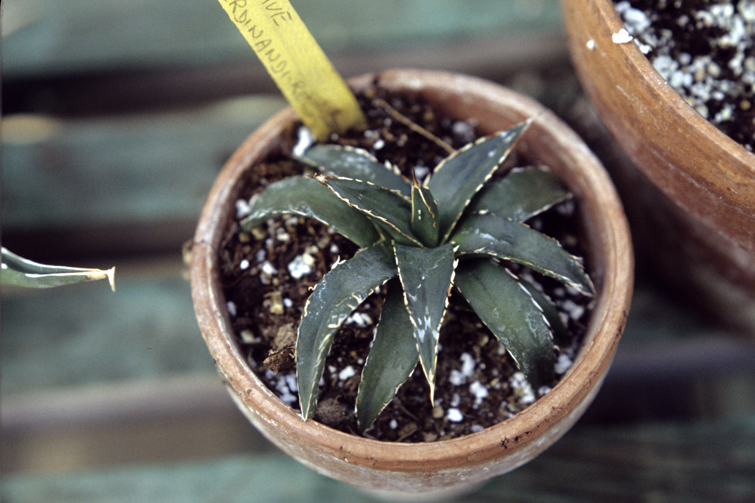 Agave ferdinandi regis